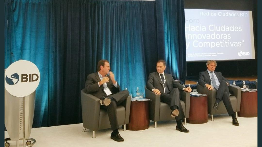 Eduardo Paes, na empresa privada onde trabalhava, BID.